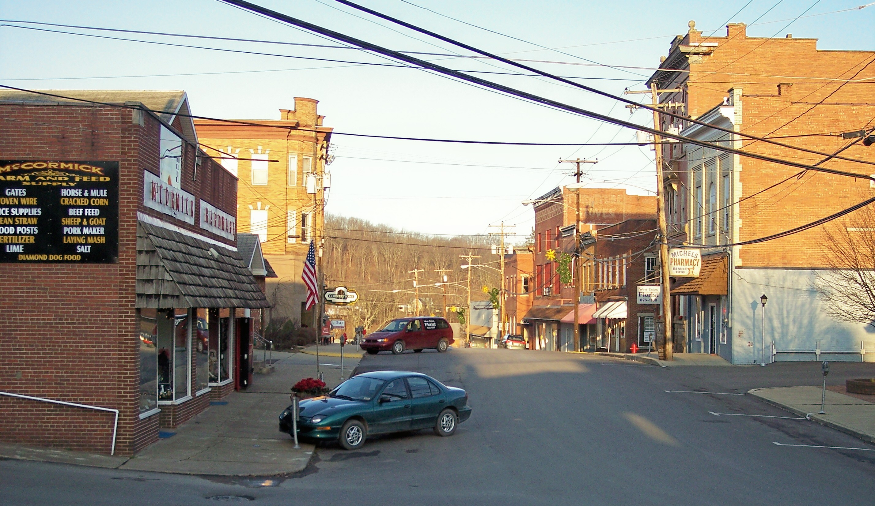 Main Street in West Union, West Virginia